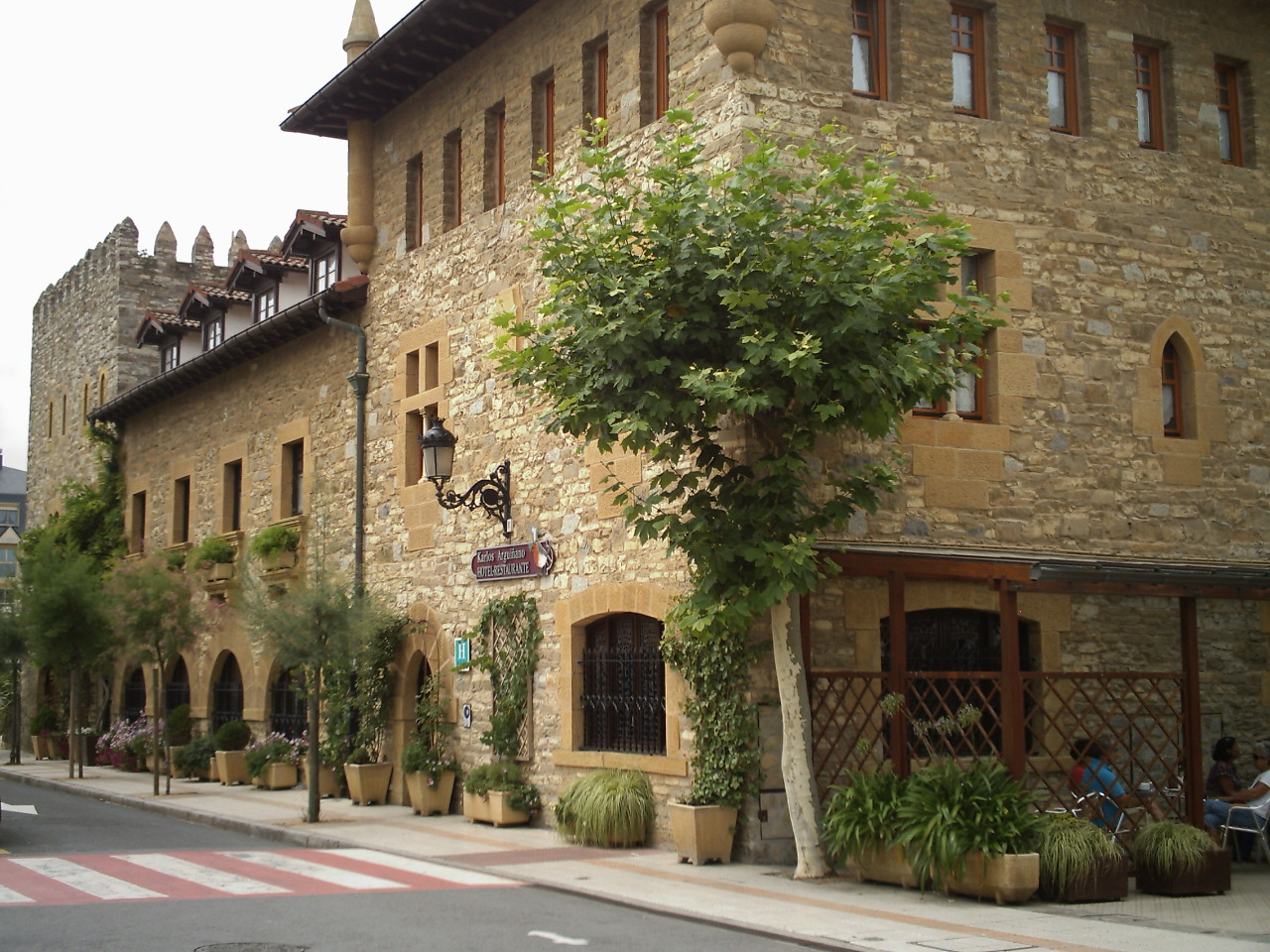 Restaurante y hotel del afamado cocinero Carlos Arguiñano, situado en la playa de Zarautz (País Vasco, España).